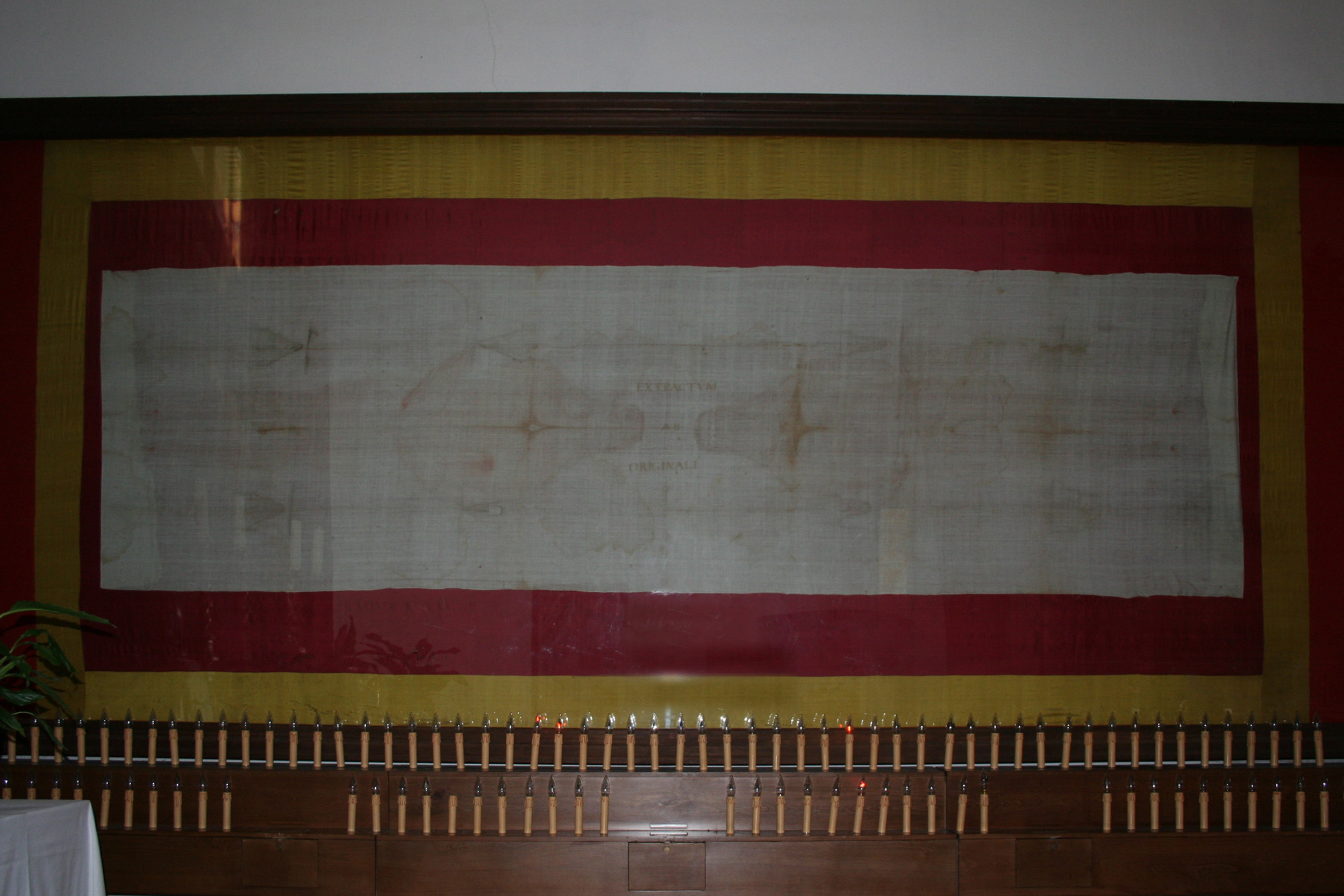 Chiesa di San Francesco di Arquata del Tronto, interno, copia della Sacra Sindone con impressa la scritta in stampatello "extractum ab originali"